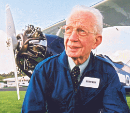 Portrait von Helmut Sinn.